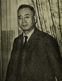 石射猪太郎（Itaro Ishii）